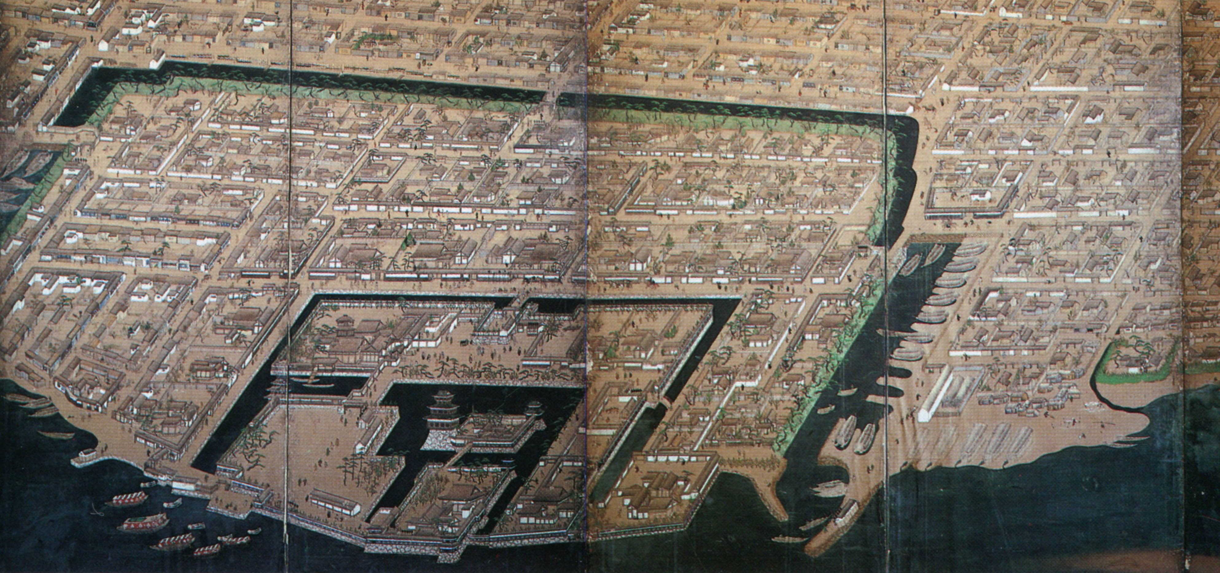 高知城および城下町絵屏風